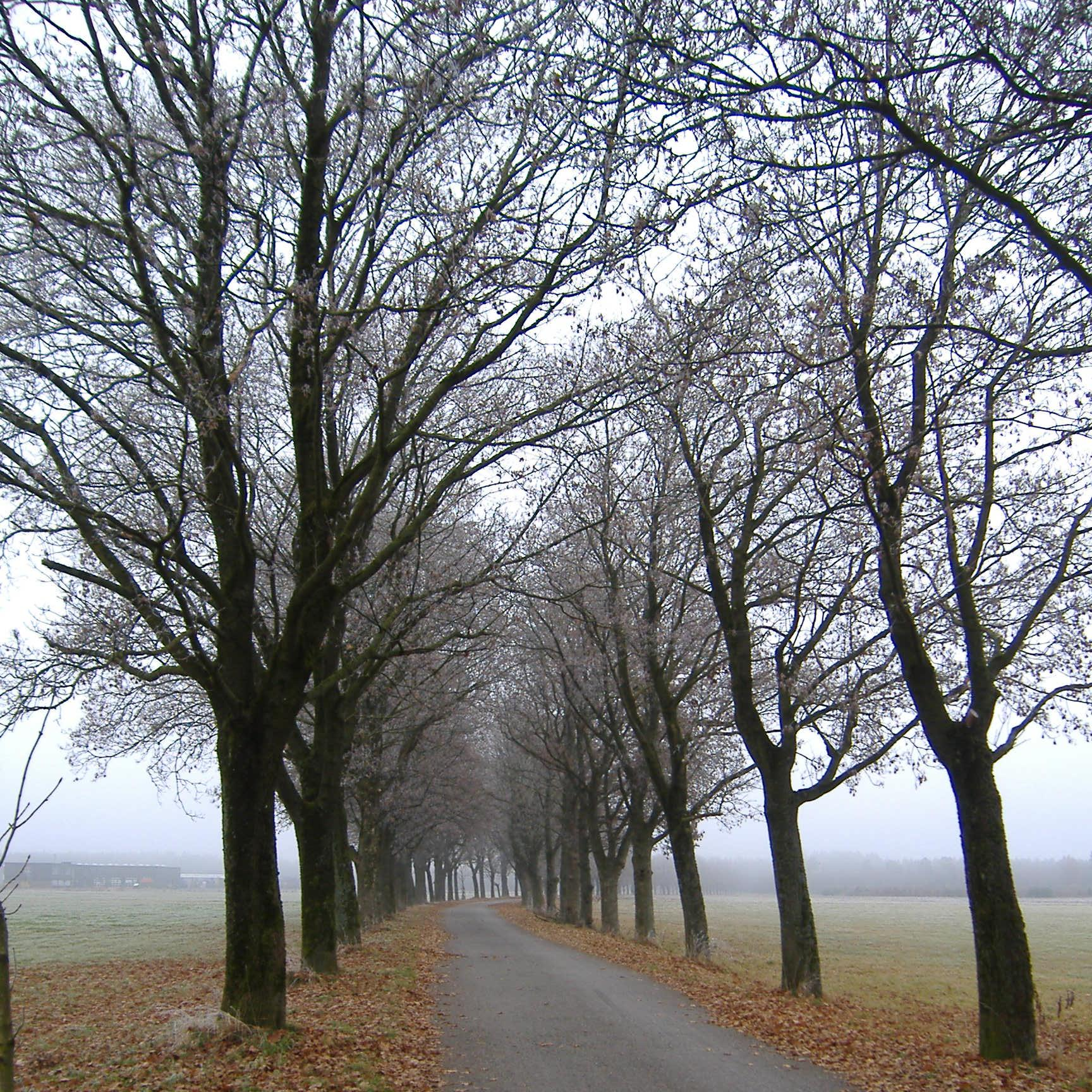 Gut Freiham